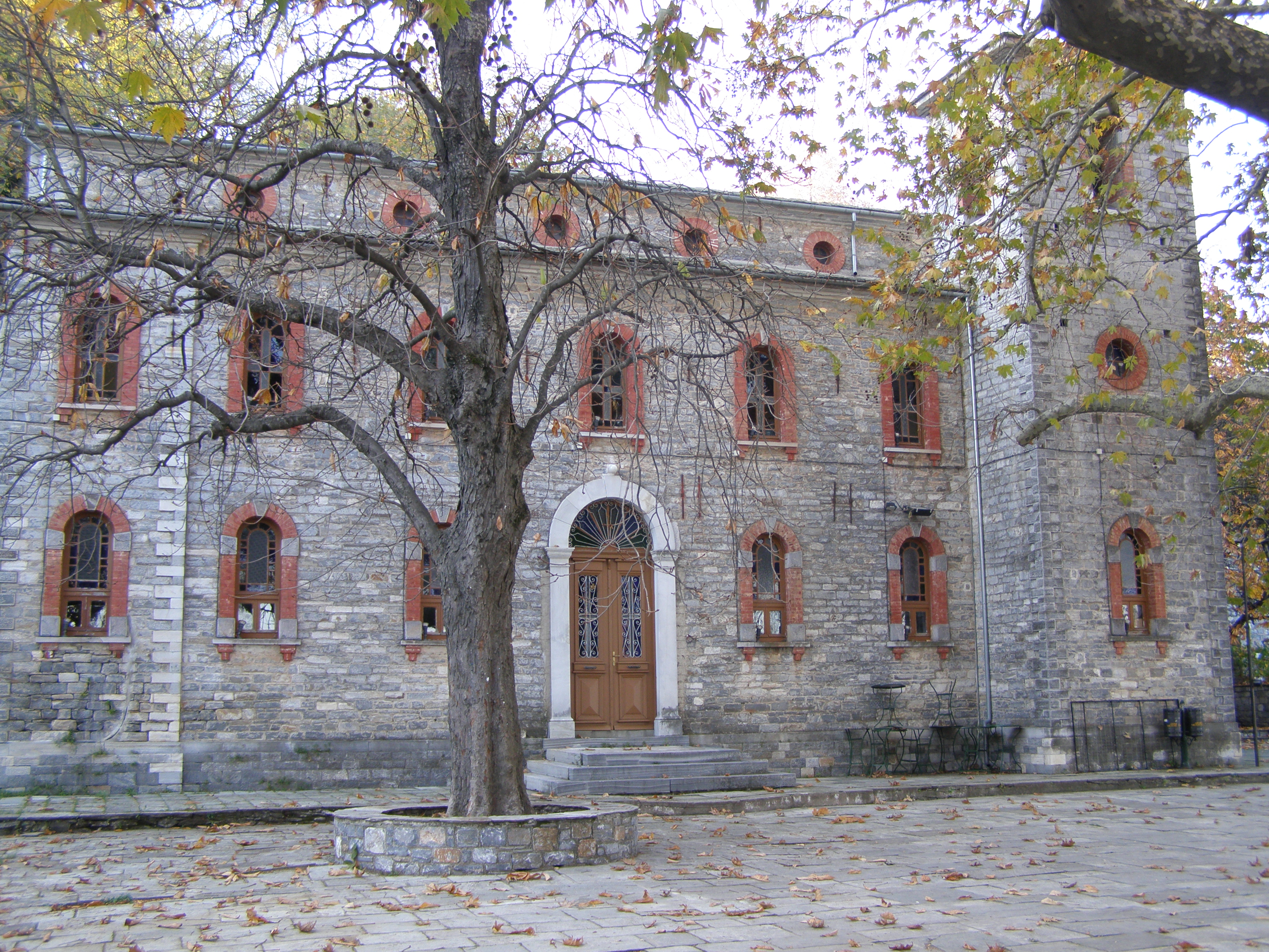 Ο ναός Αγίας Παρασκευής, στην Τσαγκαράδα